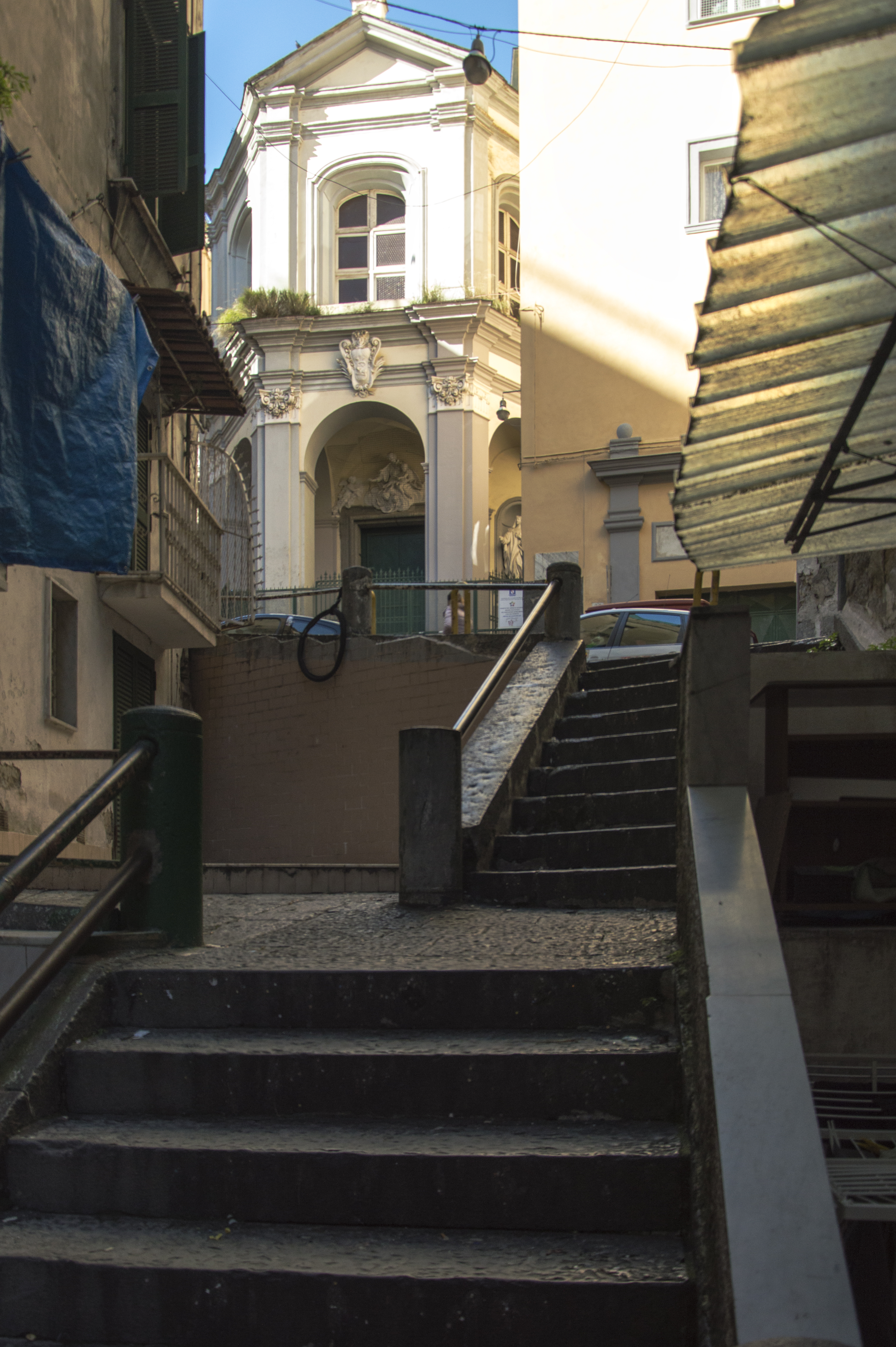 Facciata